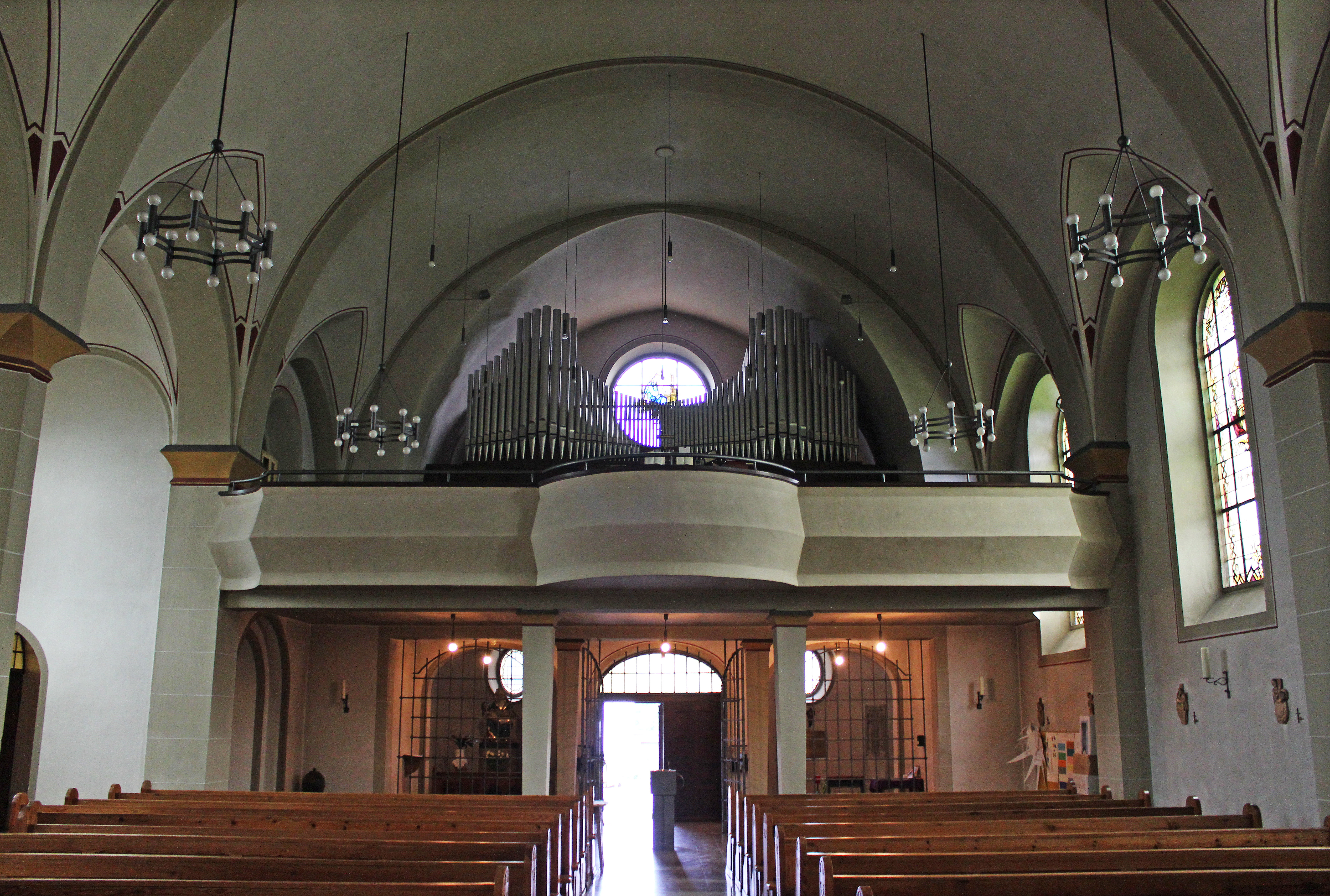 Blick ins Innere der katholischen Pfarrkirche St. Josef in Holz, einem Ortsteil der Gemeinde Heusweiler, Regionalverband Saarbrücken, Saarland